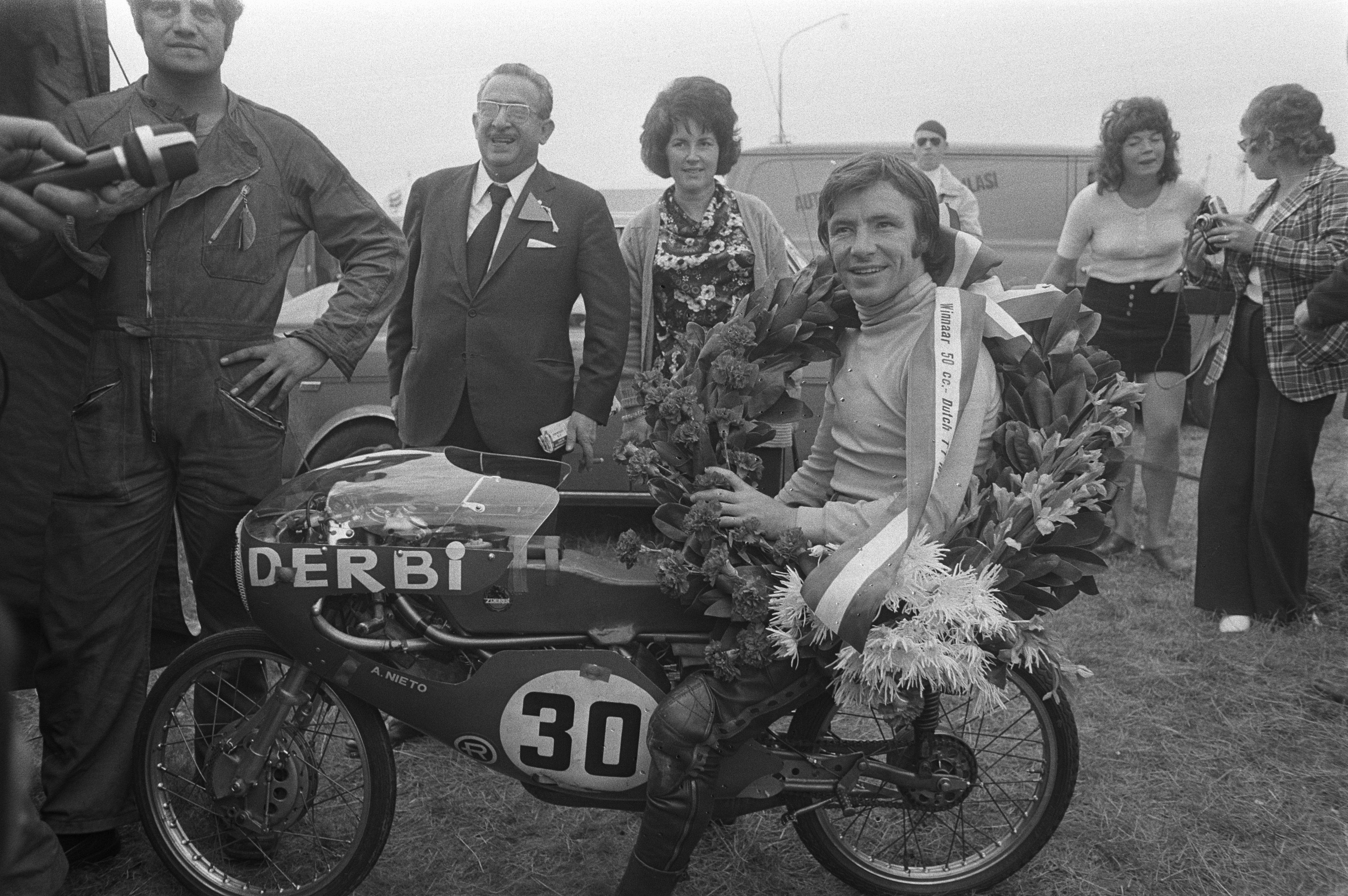 Ángel Nieto con la Derbi 50cc en Assen, 1972